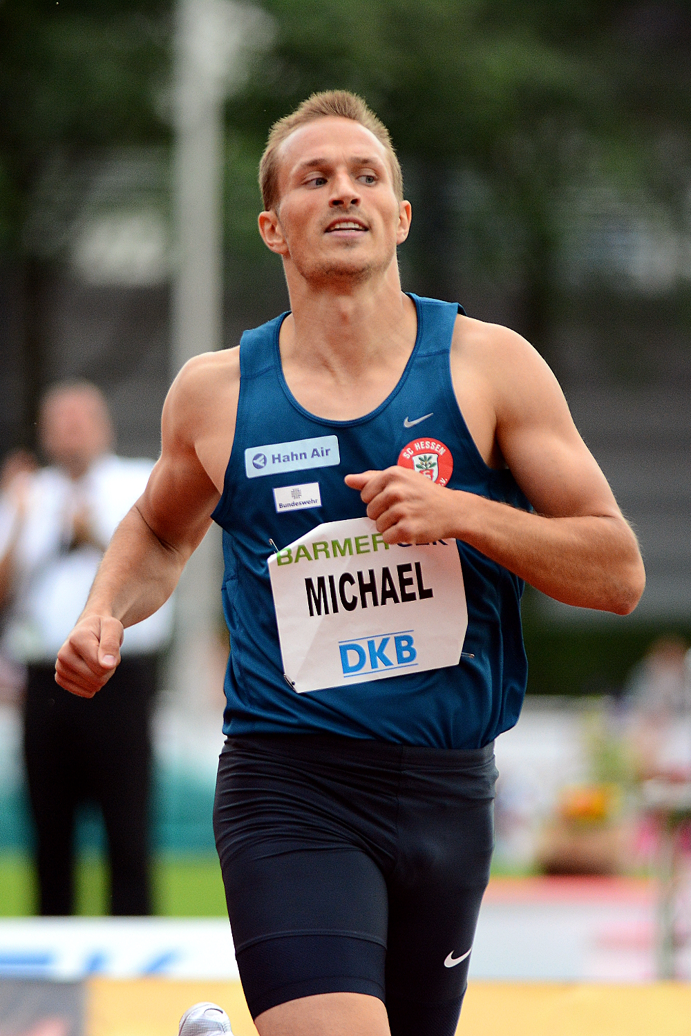 Mehrkampf-Meeting Ratingen 2015 – Michael Schrader 1500m